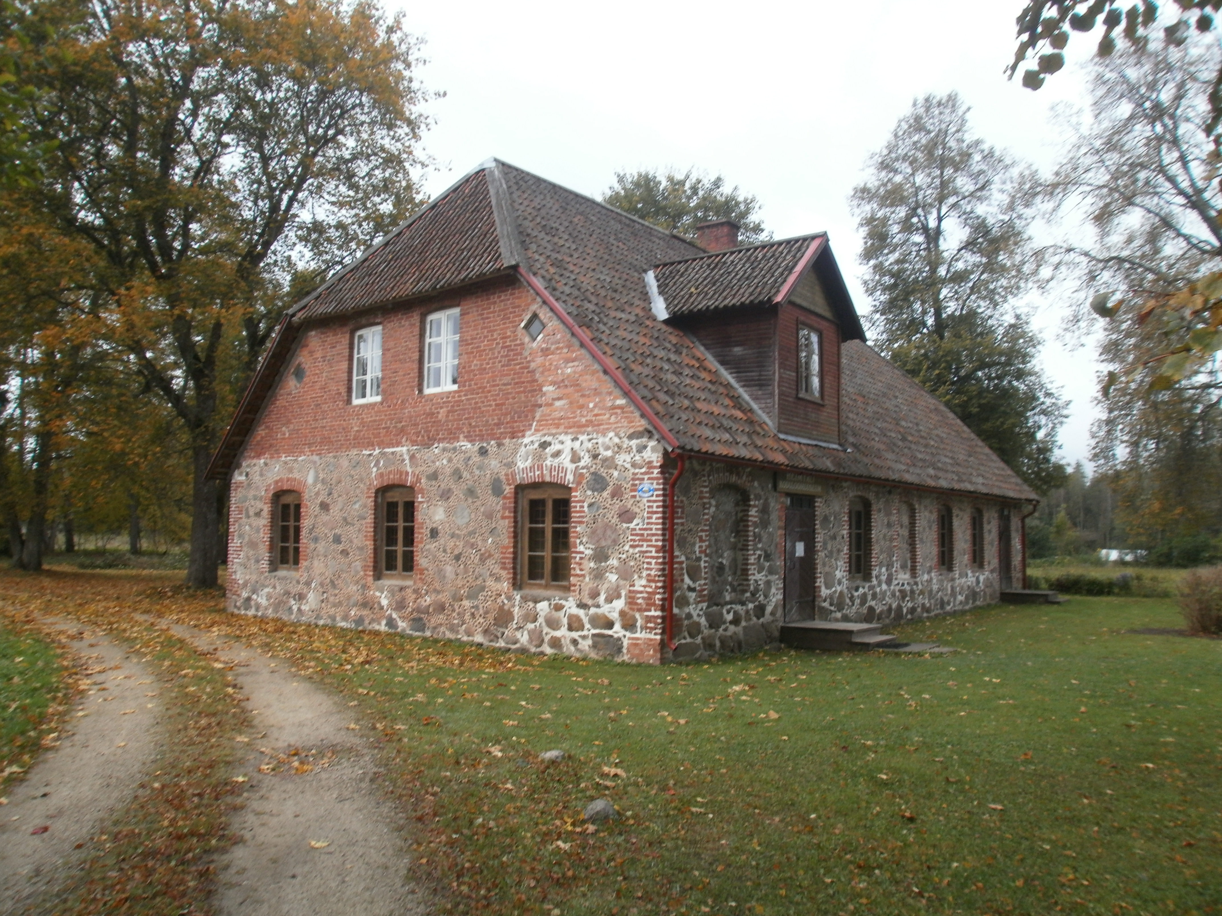 Vaade kirdest.